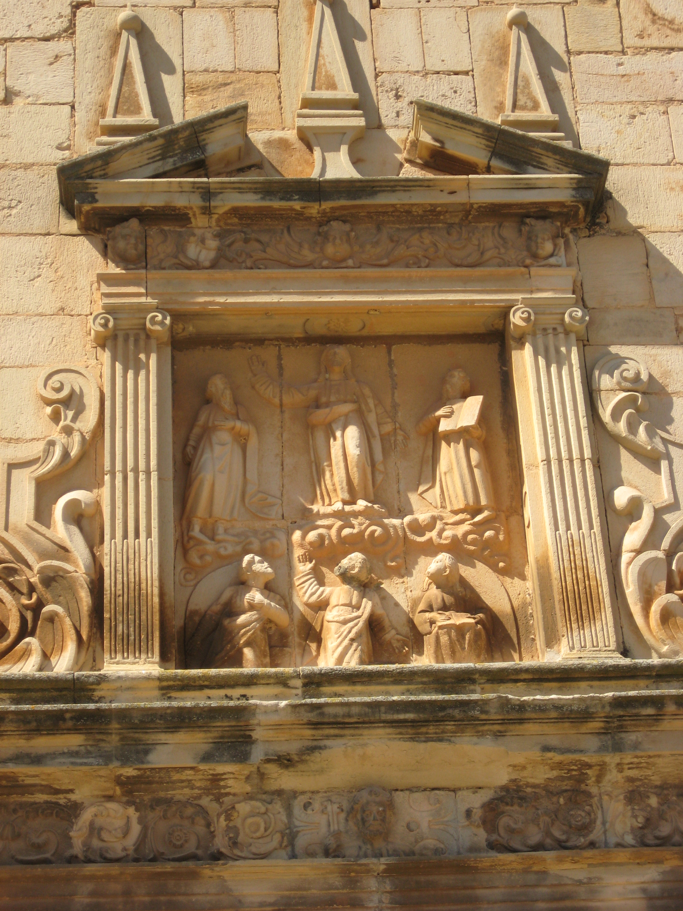 Detall de la portada principal de l'església de la Transfiguració del Senyor de les Useres (L'Alcalatén). Relleu amb l'escena bíblica de la Transfiguració de Jesús.